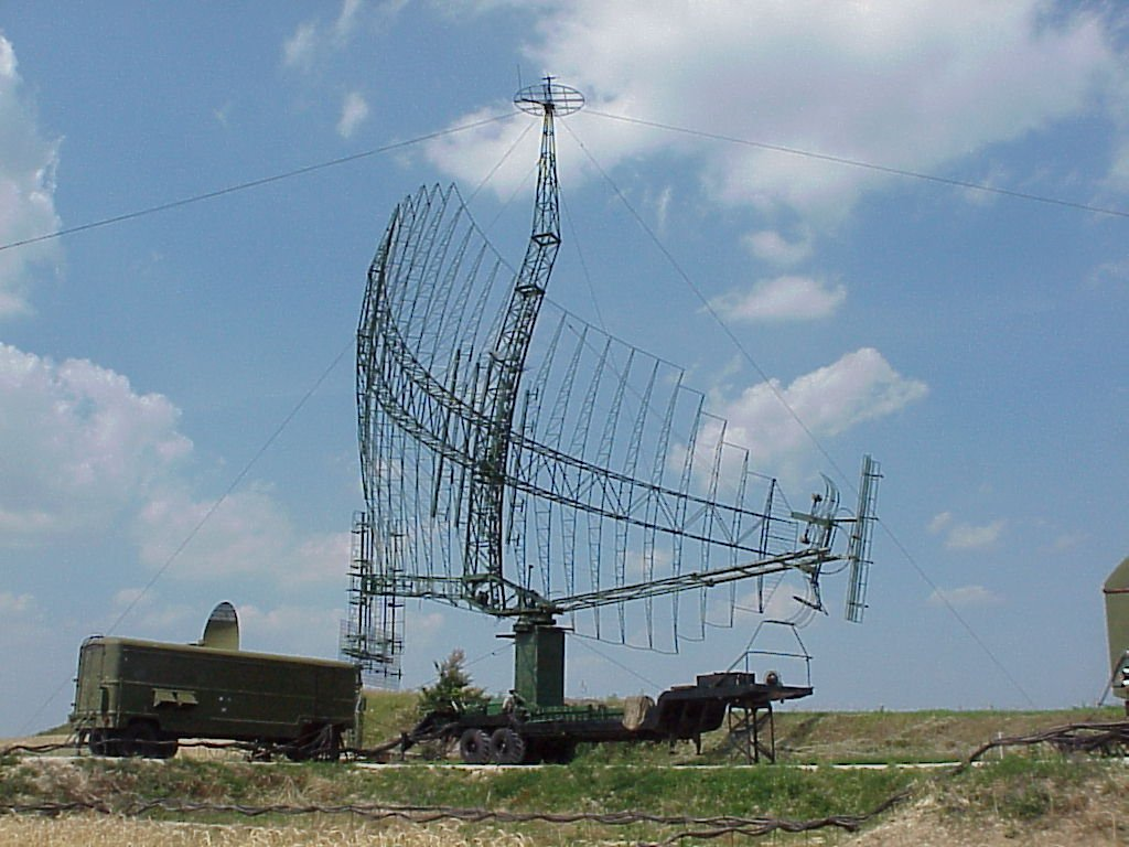 Antenne des Radargerätes Oborona. Foto der Radarantenne in Medina (Ungarn)